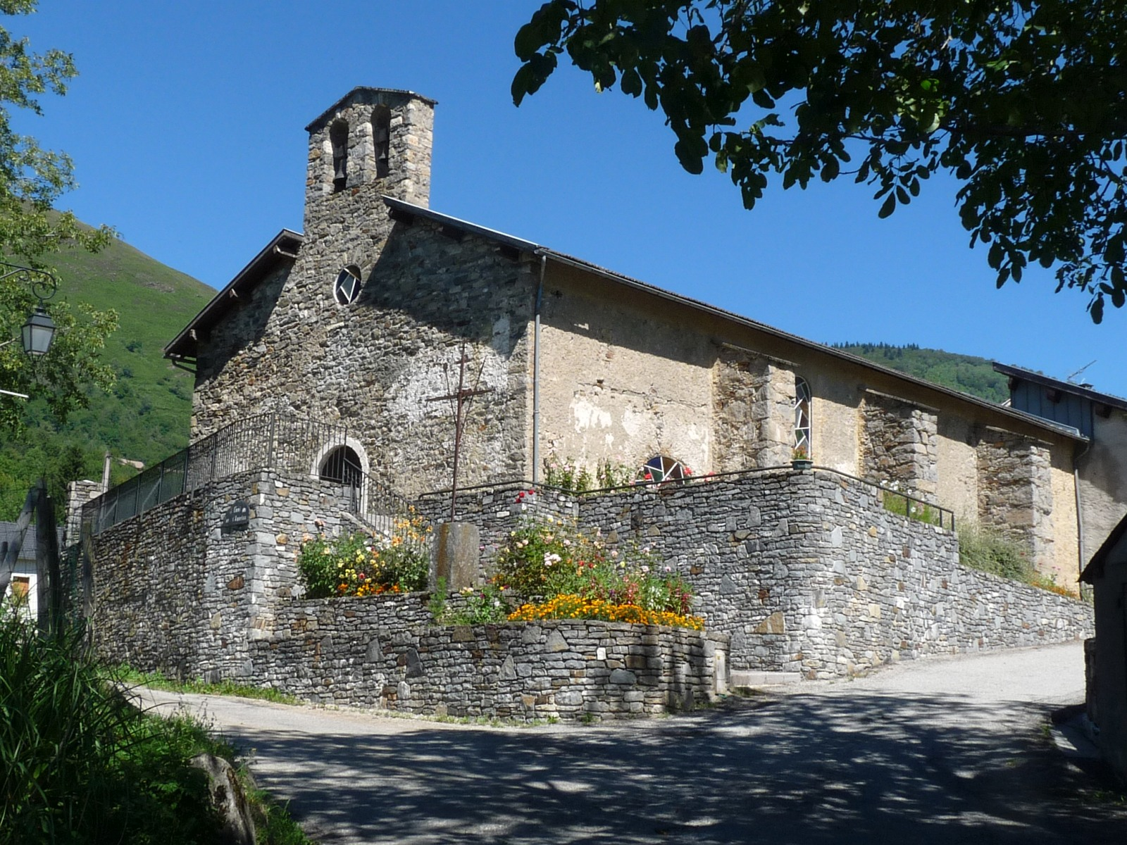 Eglise de Sorgeat, Ariège, France